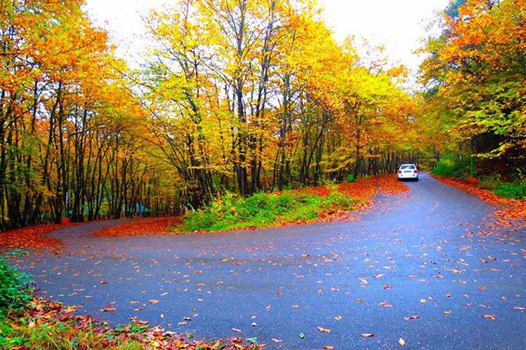 پارک جنگلی سراوان در شهرستان رشت